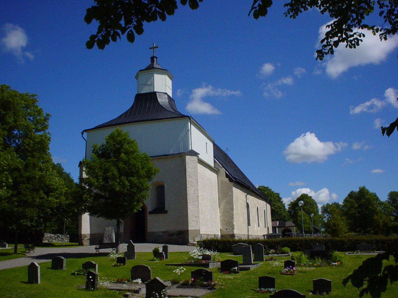 Svinnegarns kyrka. Foto Olof Ekström 2004.